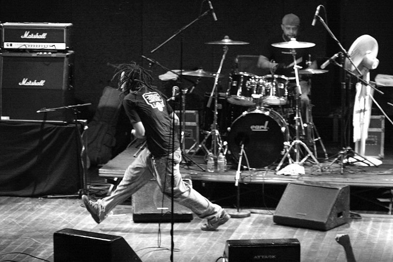 Circo Voador